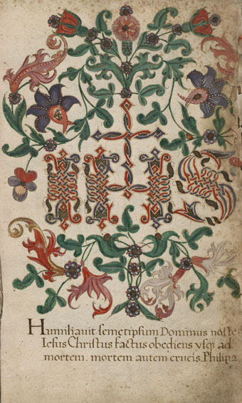 Florale Vorlagen aus dem Jahr 1592 – Jahrzeitbuch des Dominikanerinnen-Klosters St. Peter in Bludenz. Archiv: Vorarlberger Landesarchiv, Kloster St. Peter Bludenz, Handschrift 5, fol. 1a und 2a.